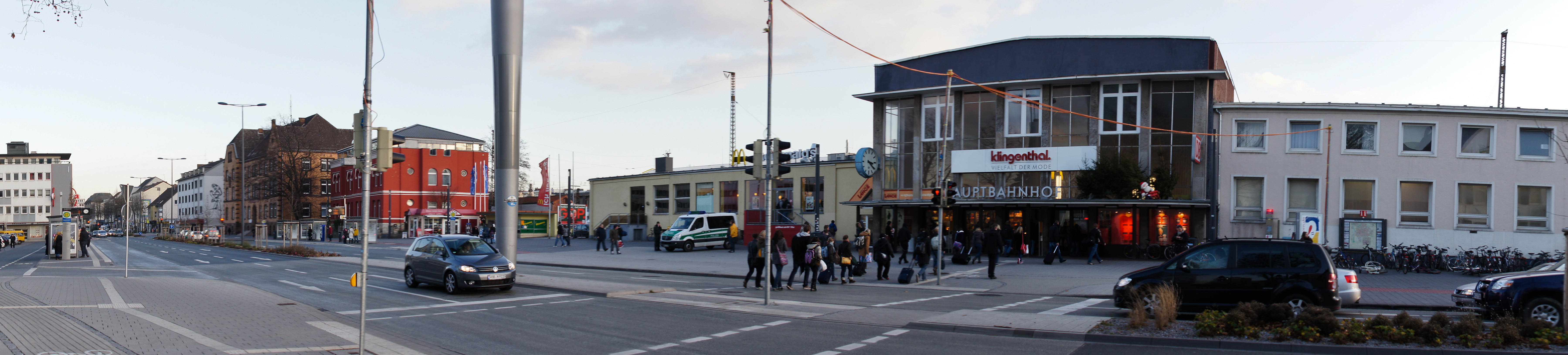 Front und Vorplatz des Paderborner Hauptbahnhofs nach der Umgestaltung